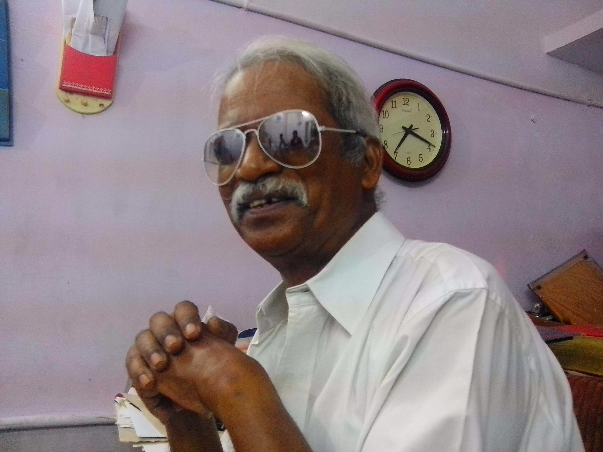 சொல்லாய்வறிஞர் ப. அருளி அவர்களின் ஒளிப்படம். இந்த ஒளிப்படம் ப. அருளி அவர்களின் தமிழூர் (திலாசுப்பேட்டை) இல்லத்தில் எடுக்கப்பெற்றது.